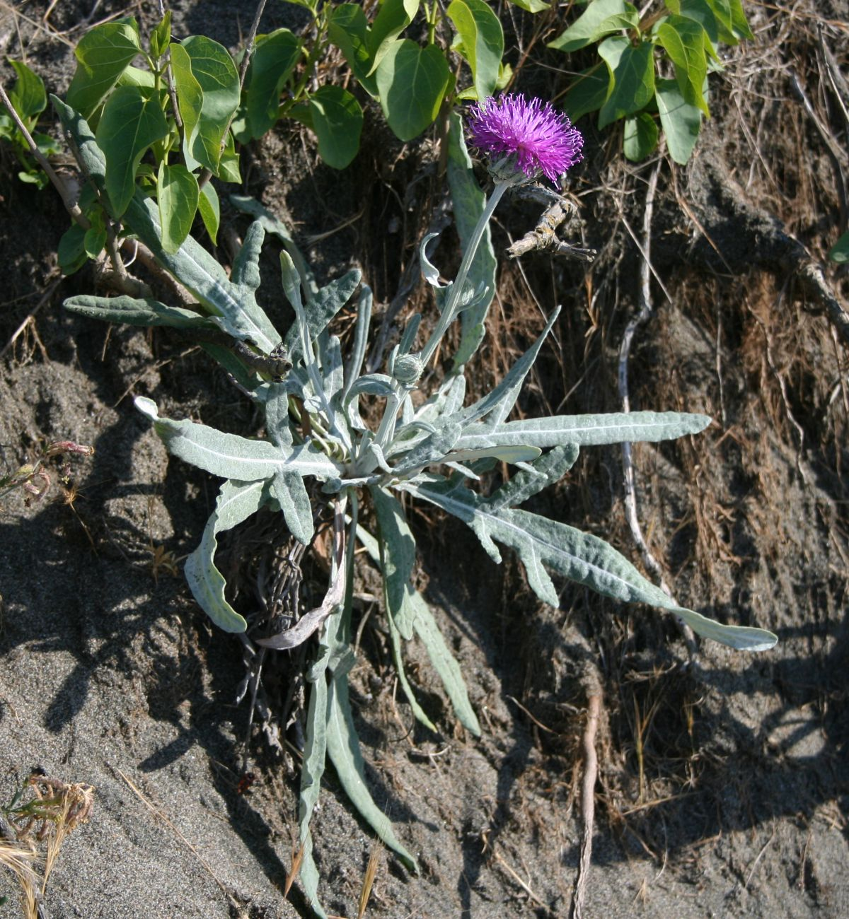 Jurinea kilaea, Korbblütler (Asteraceae) - Türkei/Türkiye/Turkey: Sakarya Prov./Sakarya ili, Sandküste des Schwarzen Meers (Karadeniz) bei Kocaali E Karasu